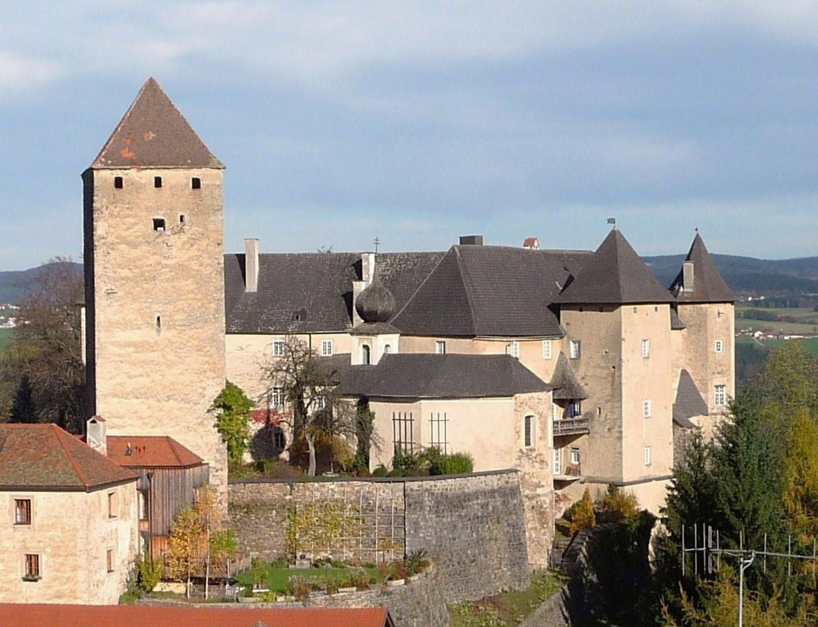 Burg Vichtenstein, Niederösterreich